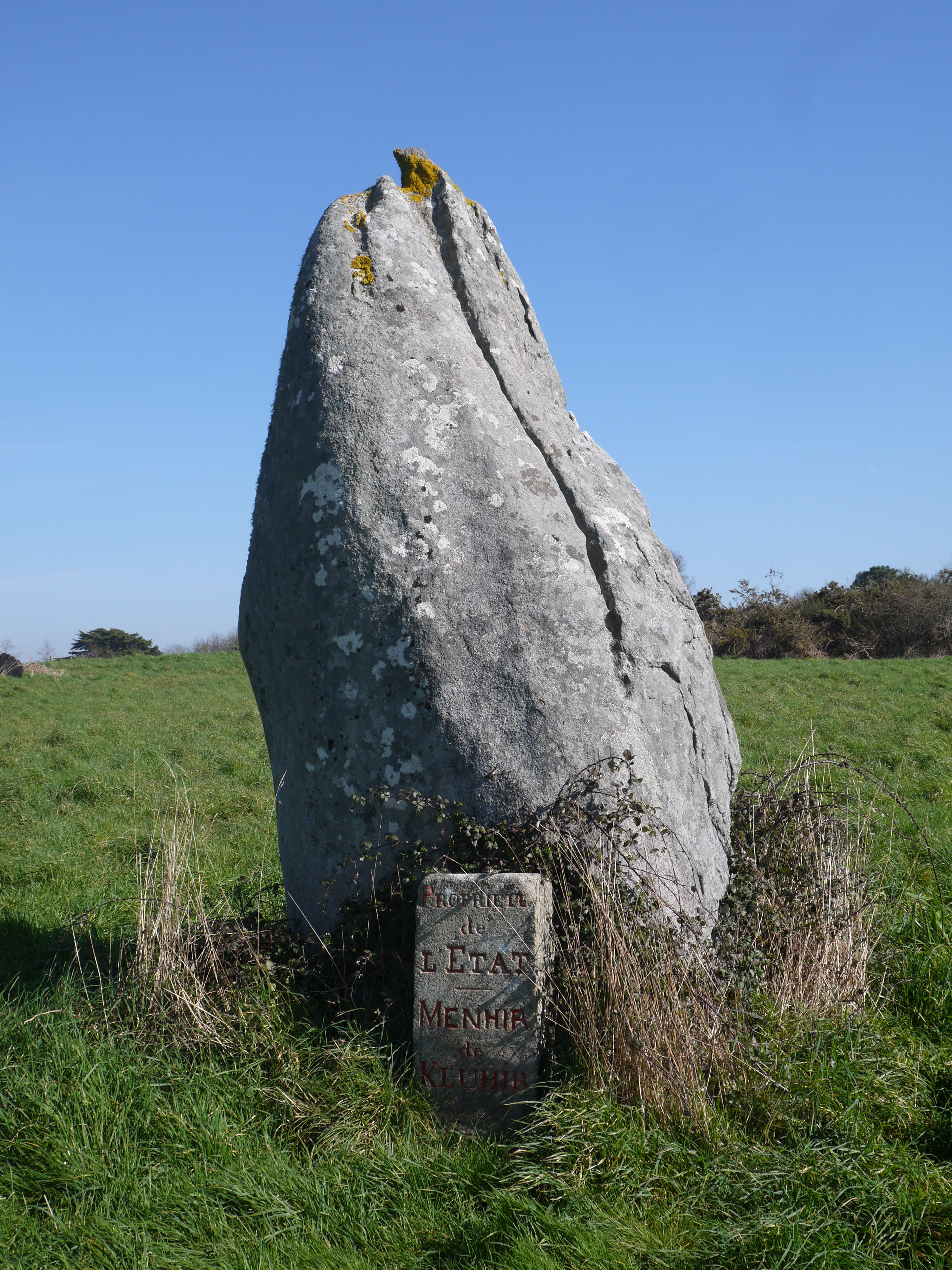 Menhir de Kerluhir à Carnac